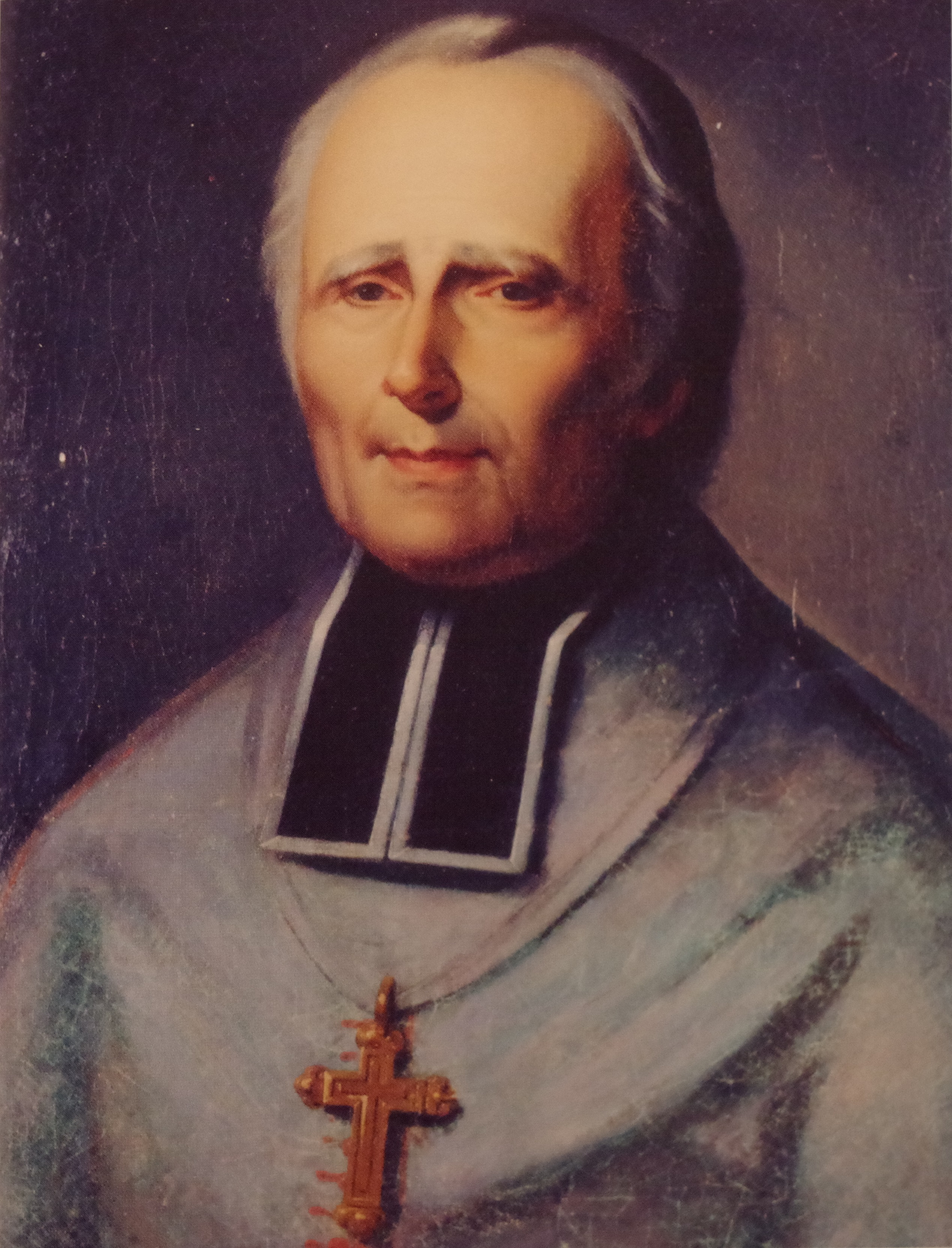 Portrait de Mgr Jean-François-Étienne Borderies, évêque de Versailles